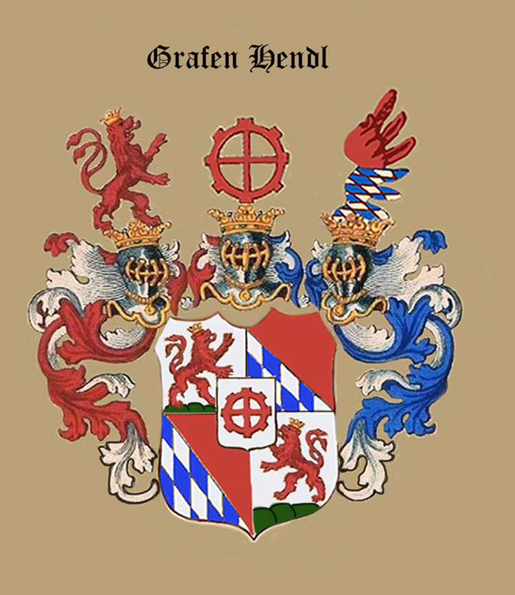 Wappen der Grafen Hendl zu Goldrain (1697)